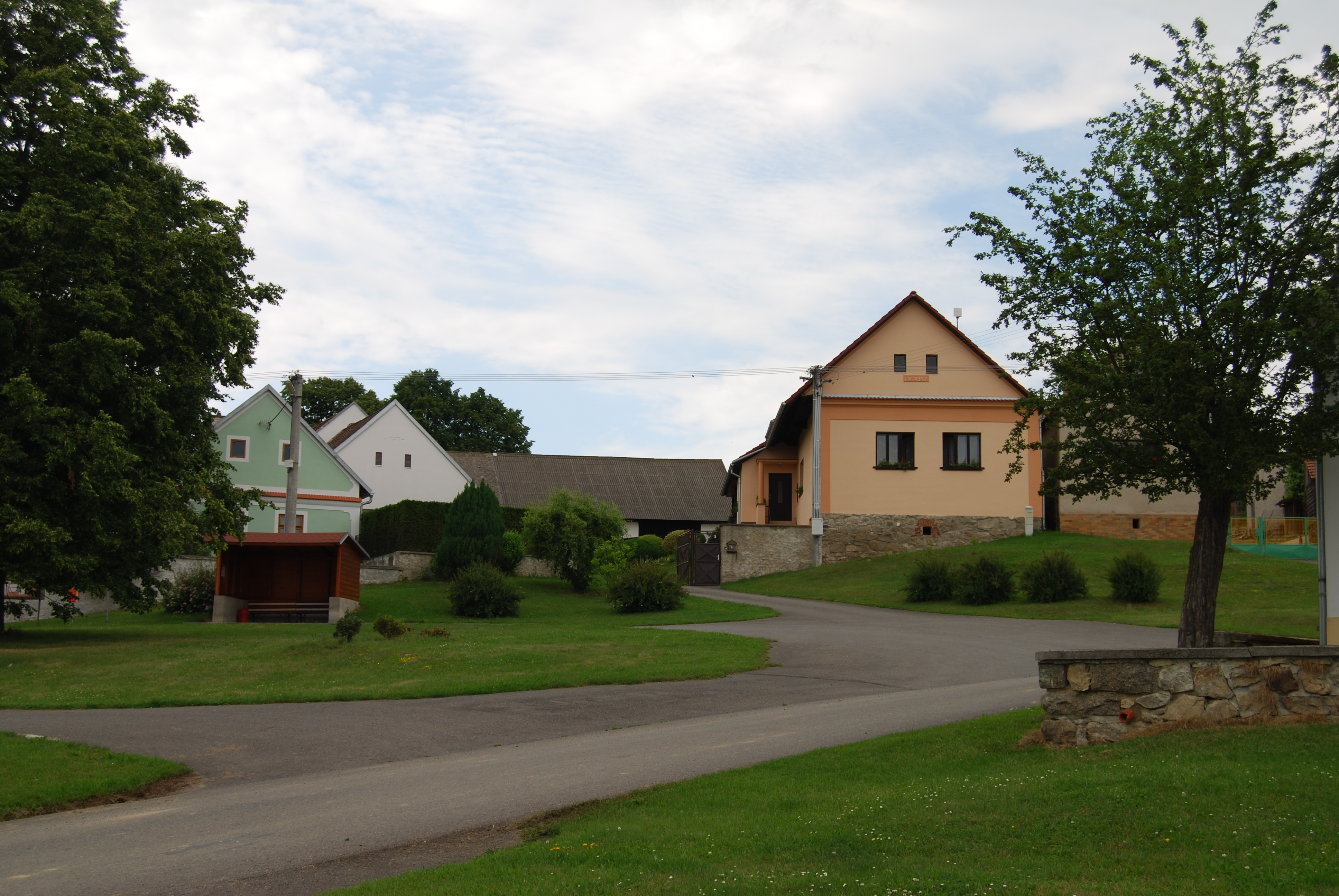 Náves v obci. Držkrajov je část obce Přeštěnice v okrese Písek. Česká republika.